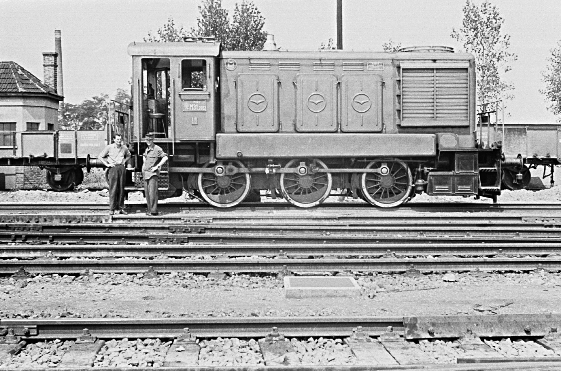 A MÁV M31.2052 pályaszámú diesel-hidraulikus mozdonya. Tags: railway, Hungarian Railways, tableau, diesel locomotive, Hungarian brand, MÁV M31 series Title: A MÁV M31.2052 pályaszámú diesel-hidraulikus mozdonya.